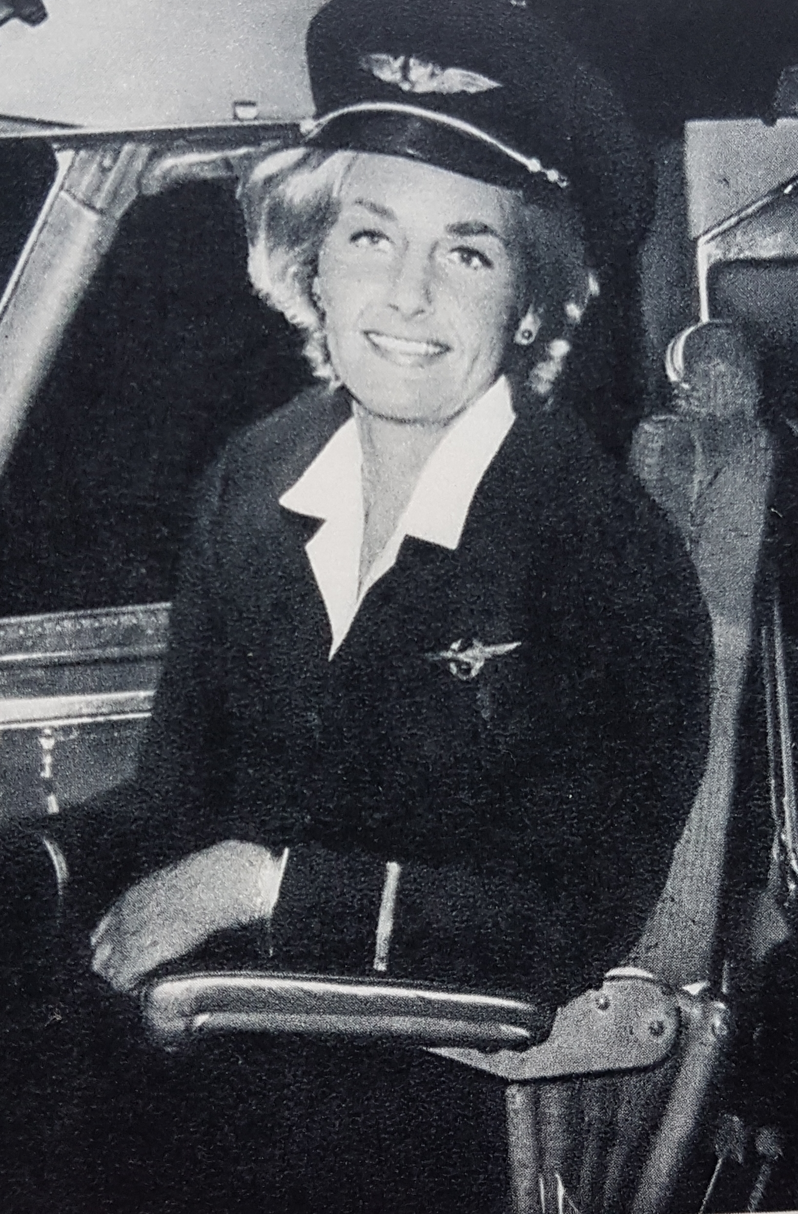 Turid Widerøe